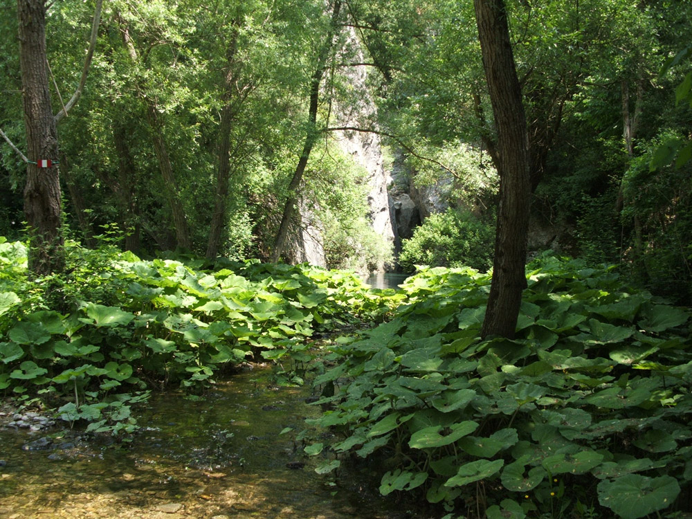 Liliana gioli - Forra di Parrano